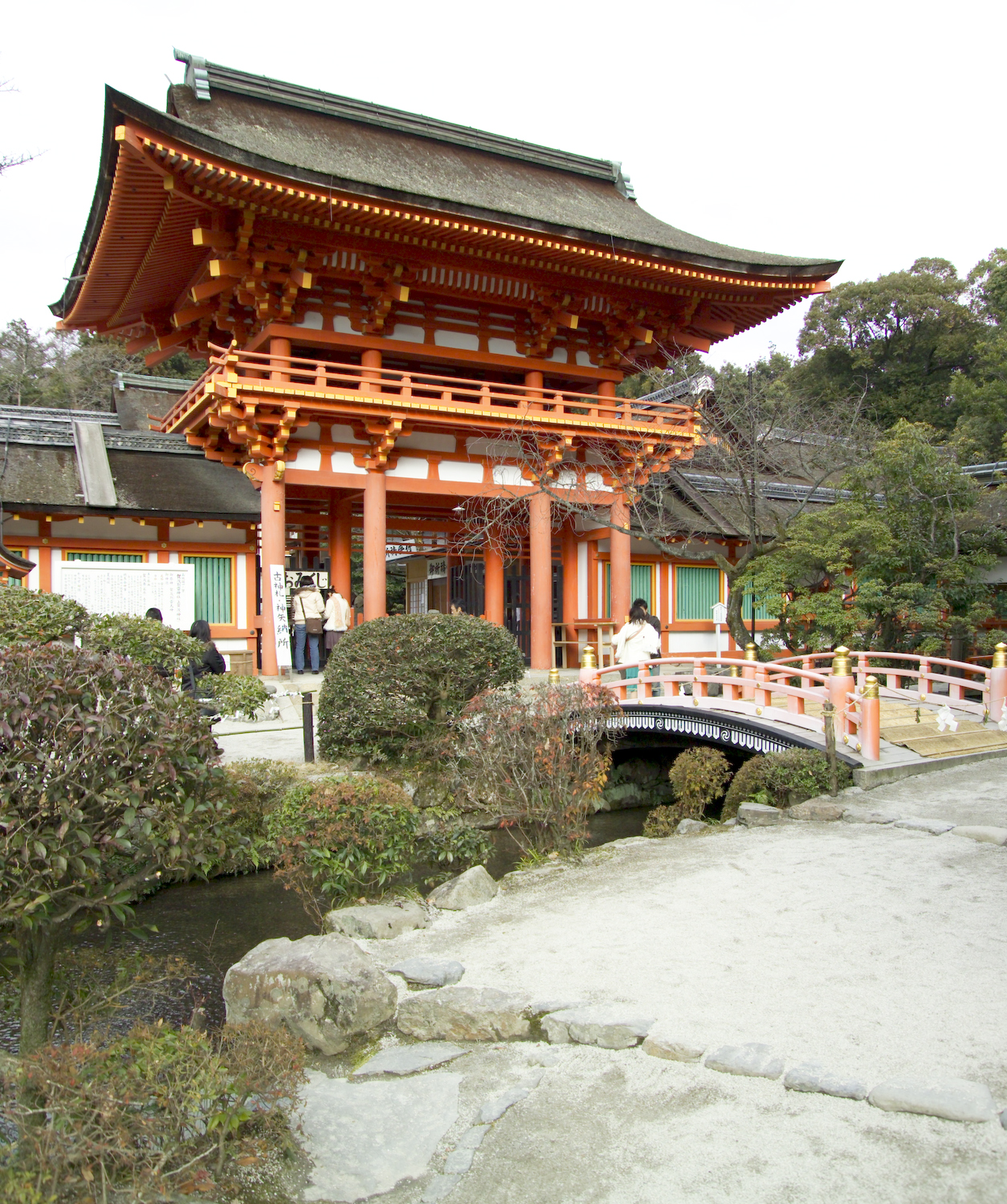 This photograph was taken at the Kamigamo Shrine, formally Kamowakeikazuchi Shrine (賀茂別雷神社, kamowakeikazuchi jinja) in Kyoto (京都), Japan.